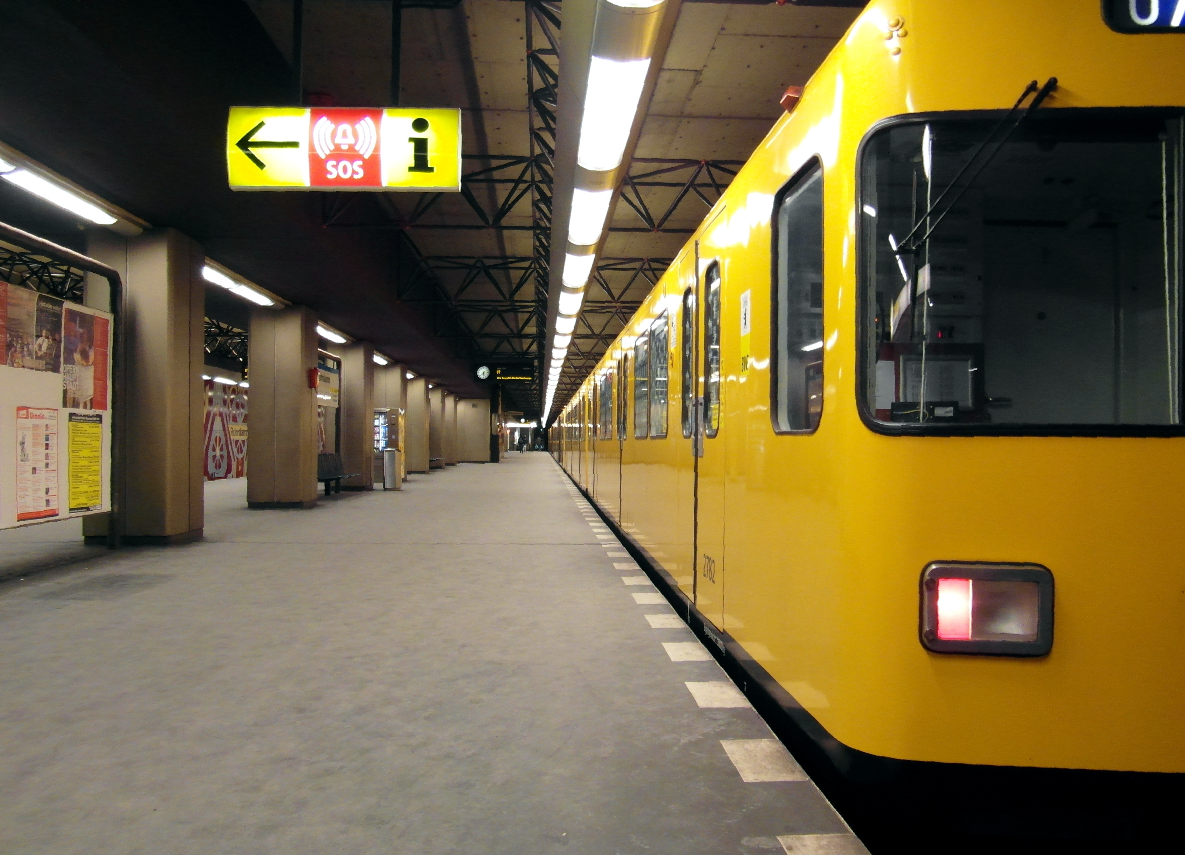 Linie U7